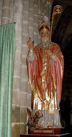 Landreger. Delwenn sant Tual en iliz-veur